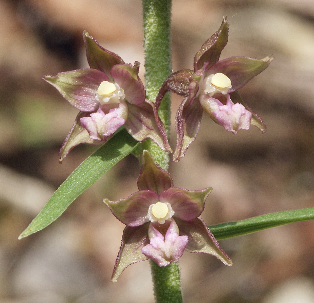 Epipactis atrorubens, Schwäbische Alb, Germany